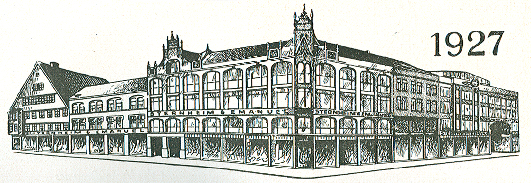 Scan einer Kopie eines Holzschnittes des Kaufhauses Sternheim & Emanuel von 1927; von links ist die Gebäudereihe mit hinzugekauften Häusern in der Osterstraße zu sehen, etwa in der Bildmitte der 1896 als Neubau errichtete Eckgebäude und rechts davon hinzugekaufte Grundstücke und - umgebaute - Gebäude in der Großen Packhofstraße ...